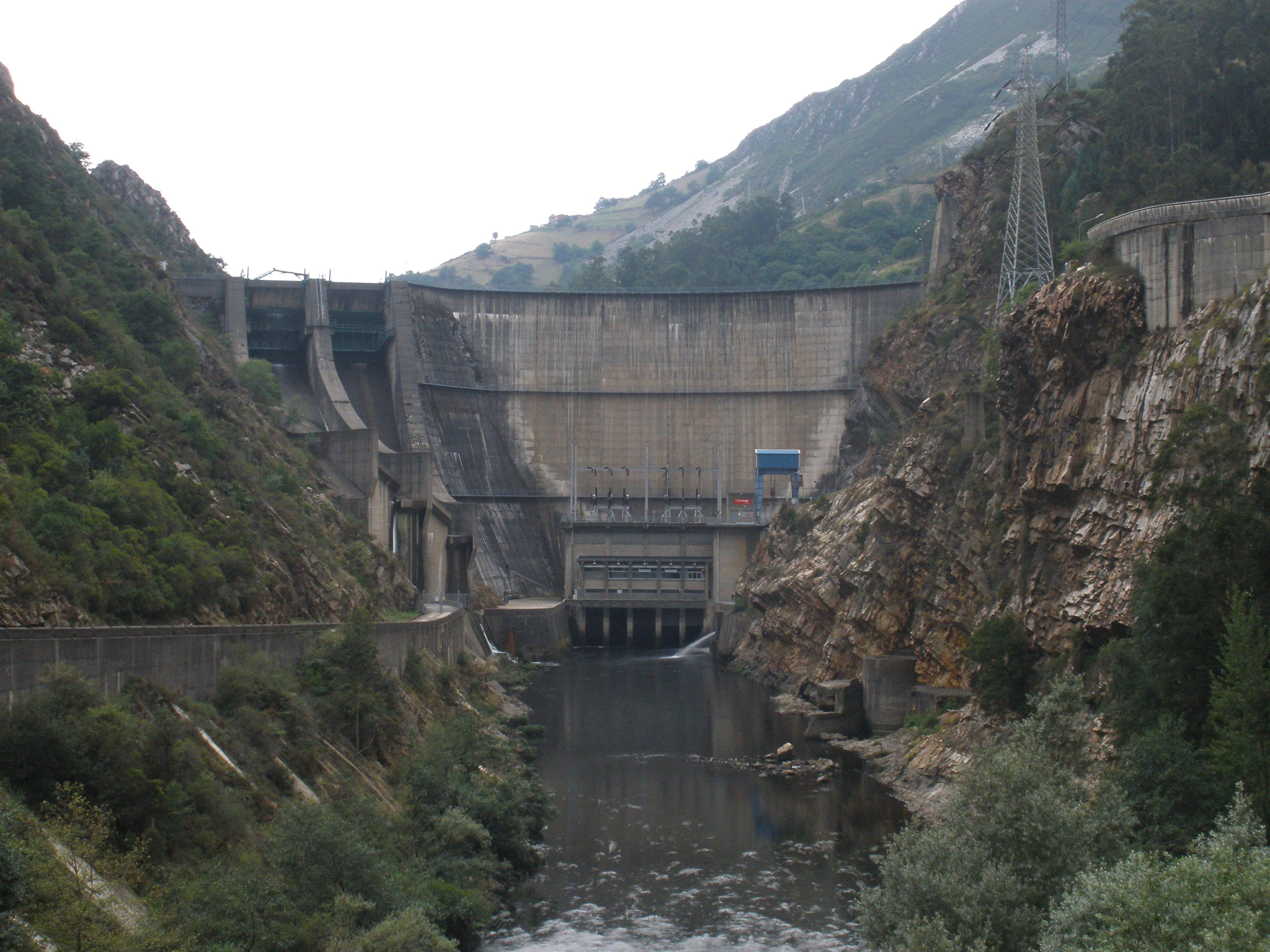 Vista general de la presa y la central hidroeléctrica de La Barca.